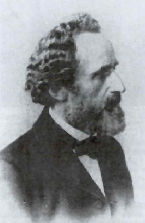 Image of Ernst Kapp, Philosopher. Sonstiges: Photograph länger als 70 Jahre tot, fehlende Schöpfungshöhe des Scanns